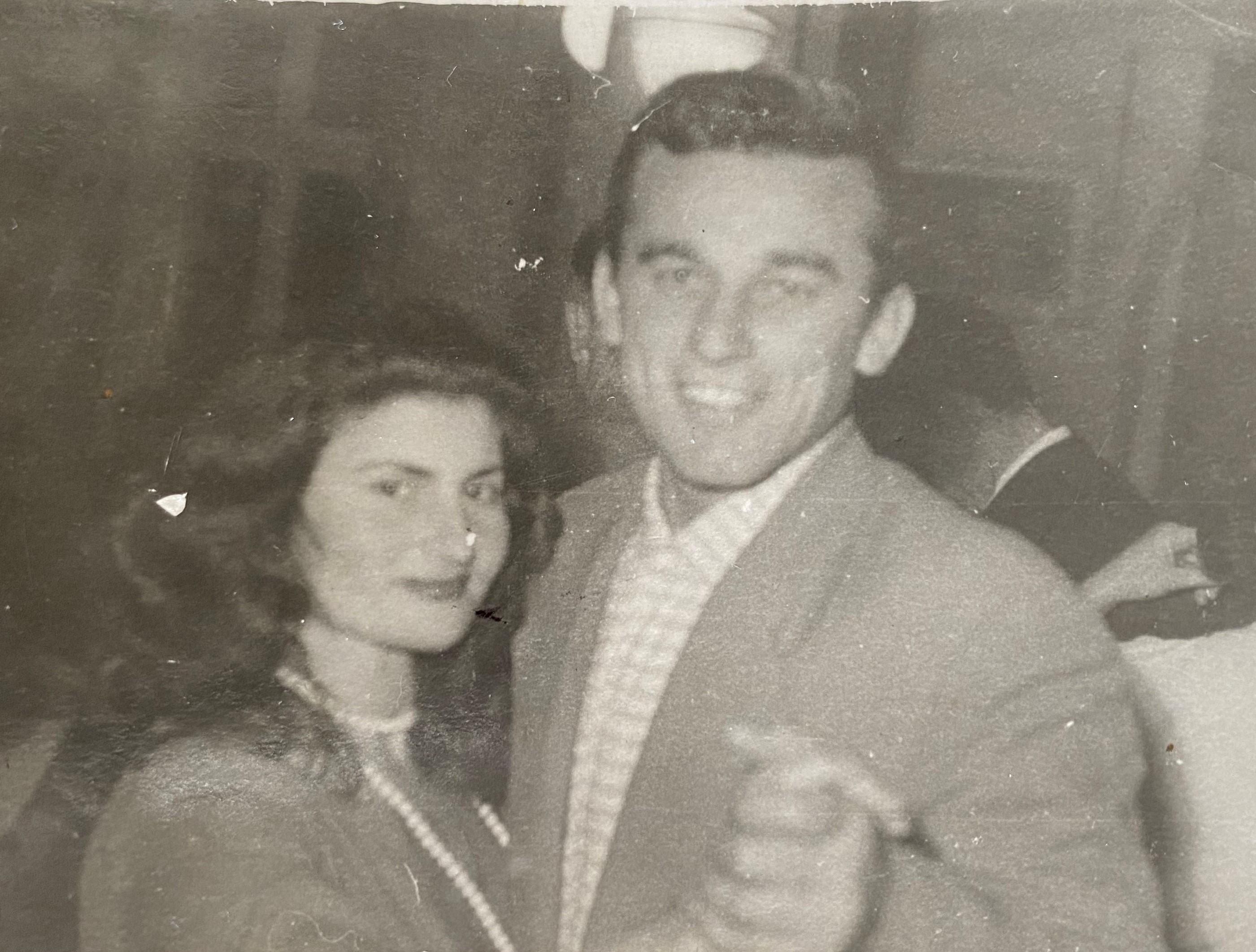 Abdurrahman Roza Haxhiu me të shoqen